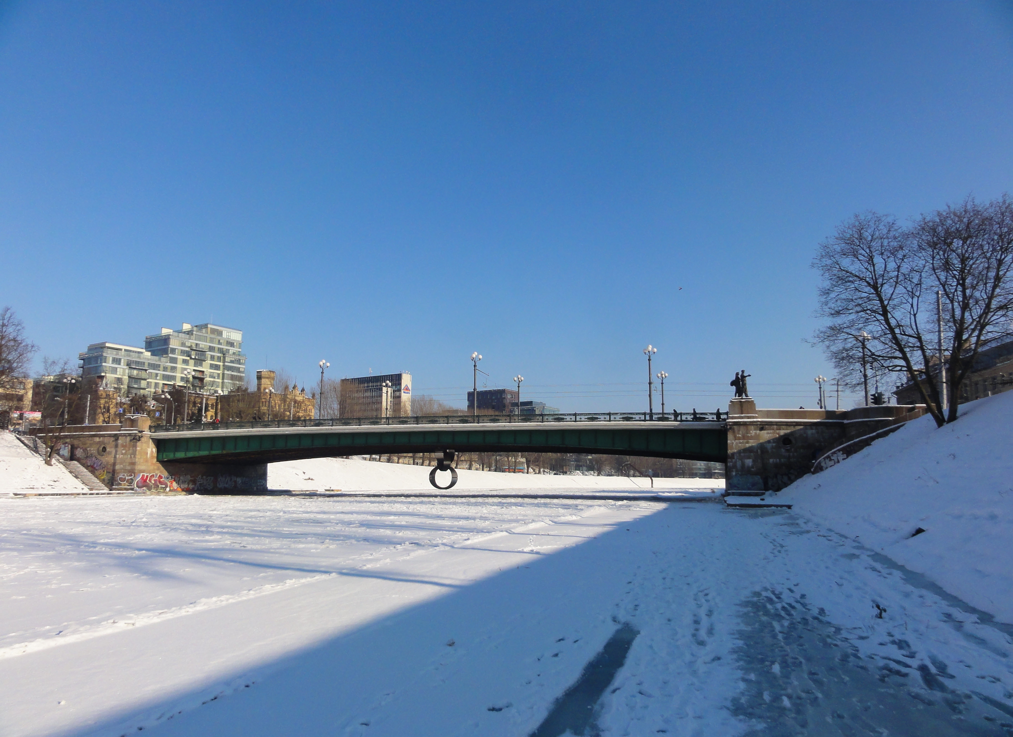 Green Bridge (Vilnius)